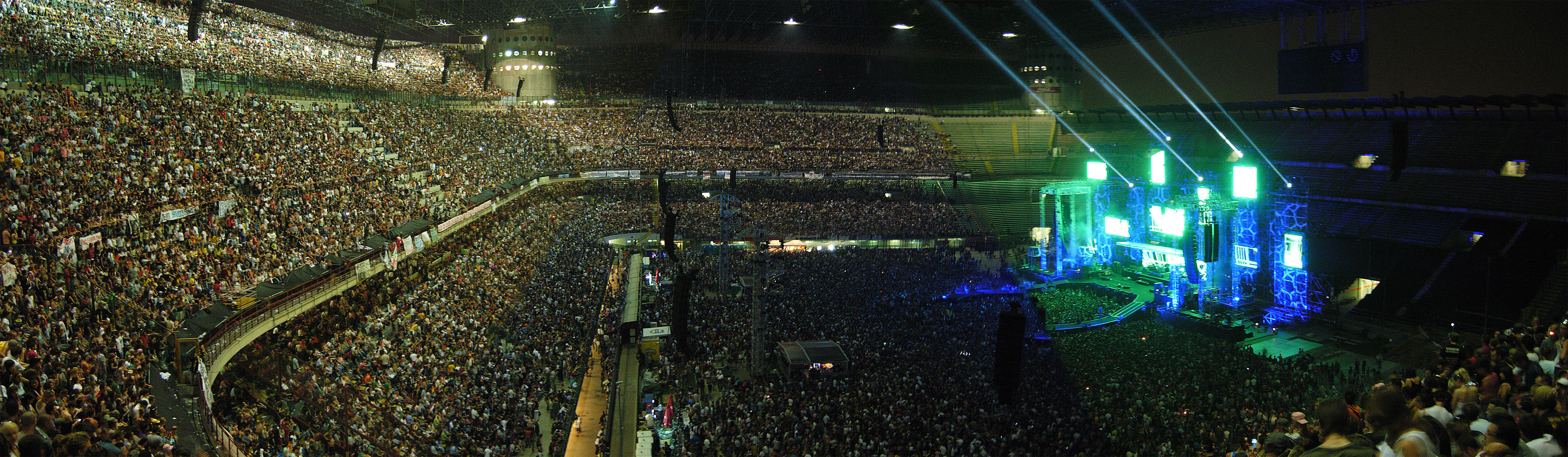 San Siro Stadium Panorama during Vasco Rossi Concert